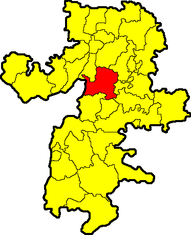 Чебаркульский район на карте Челябинской области